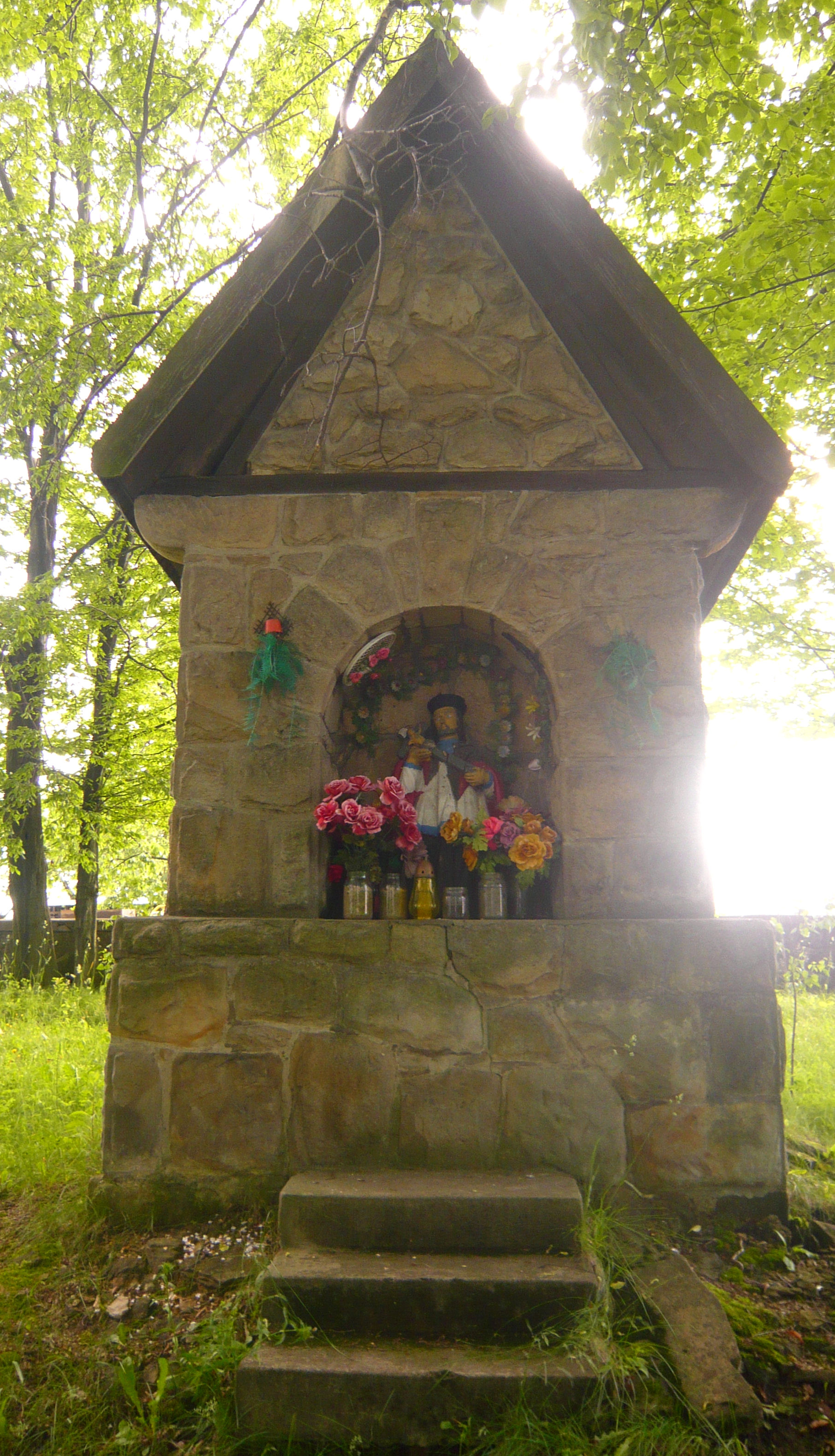 Cmentarz wojenny 119 Staszkówka